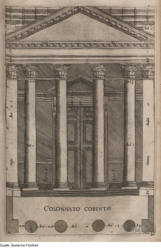 Original image description from the Deutsche Fotothek Architektur & Giebel & Architrav & Gesims & Kapitell & Akanthus & Volute & Säule & Basis & Säulenordnung